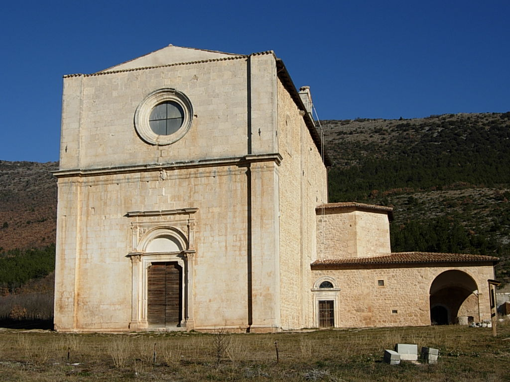 Chiesa di Santa Maria dei Cintorelli nel Comune di Caporciano (AQ) sulla piana di Navelli. Foto personale